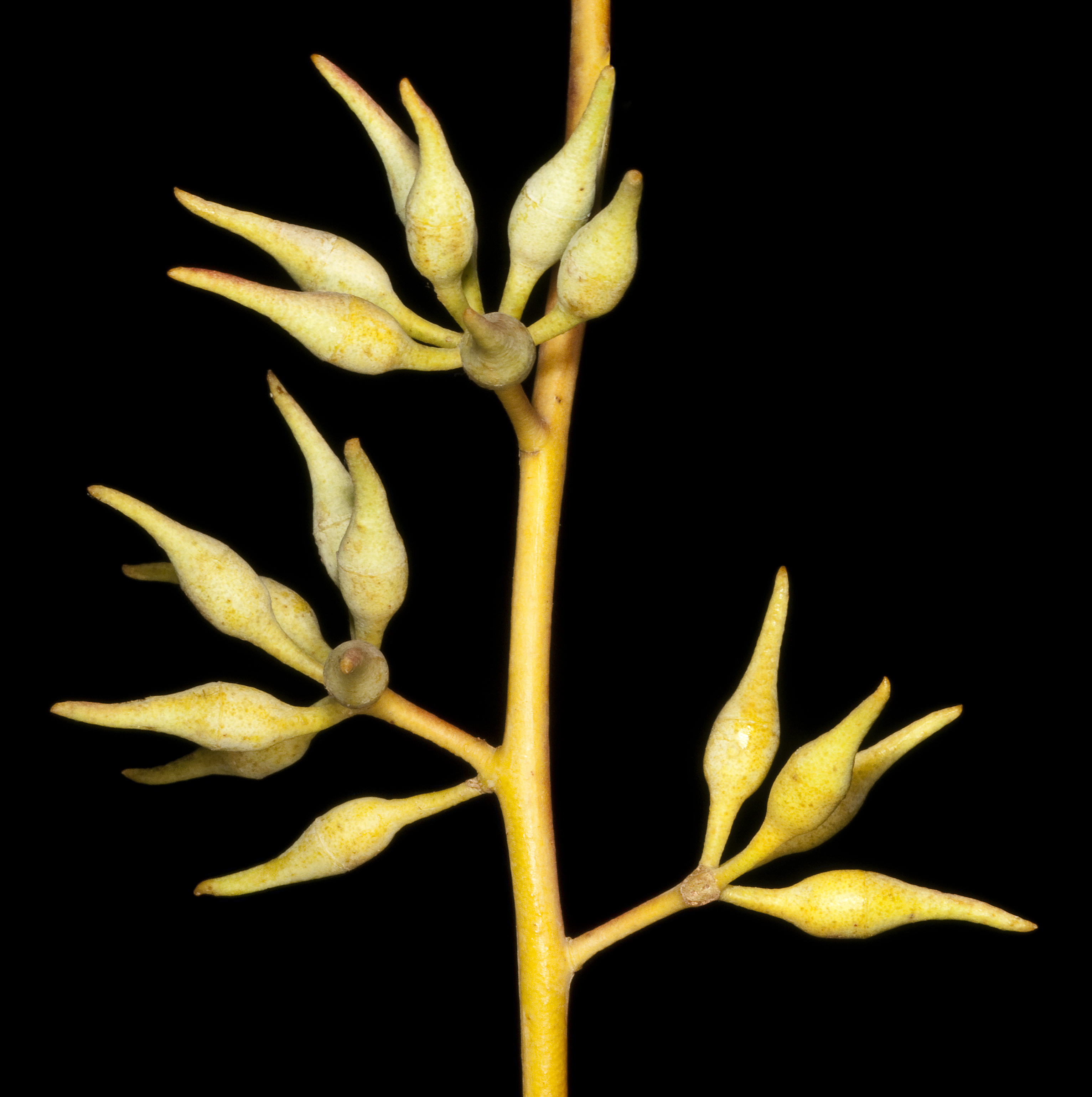 KRT4535